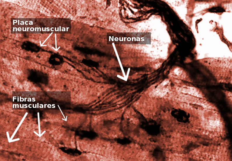 Placa neuromuscular (unión neuromuscular, articulación neuromuscular).